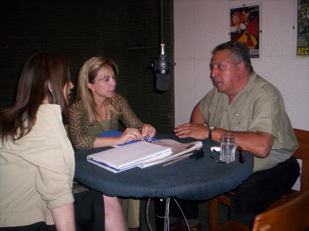 Cesar Arredondo en Izquierdo femenino, Radio Terra